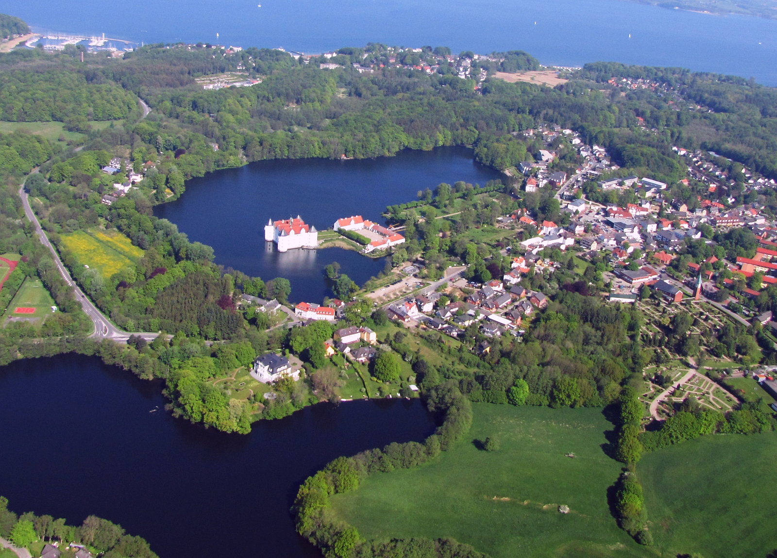 Luftbild der Stadt Glücksburg (Ostsee) an der Flensburger Förde im Kreis Schleswig-Flensburg, Schleswig-Holstein - Foto Wolfgang Pehlemann Steinberg/Ostsee IMG_6251